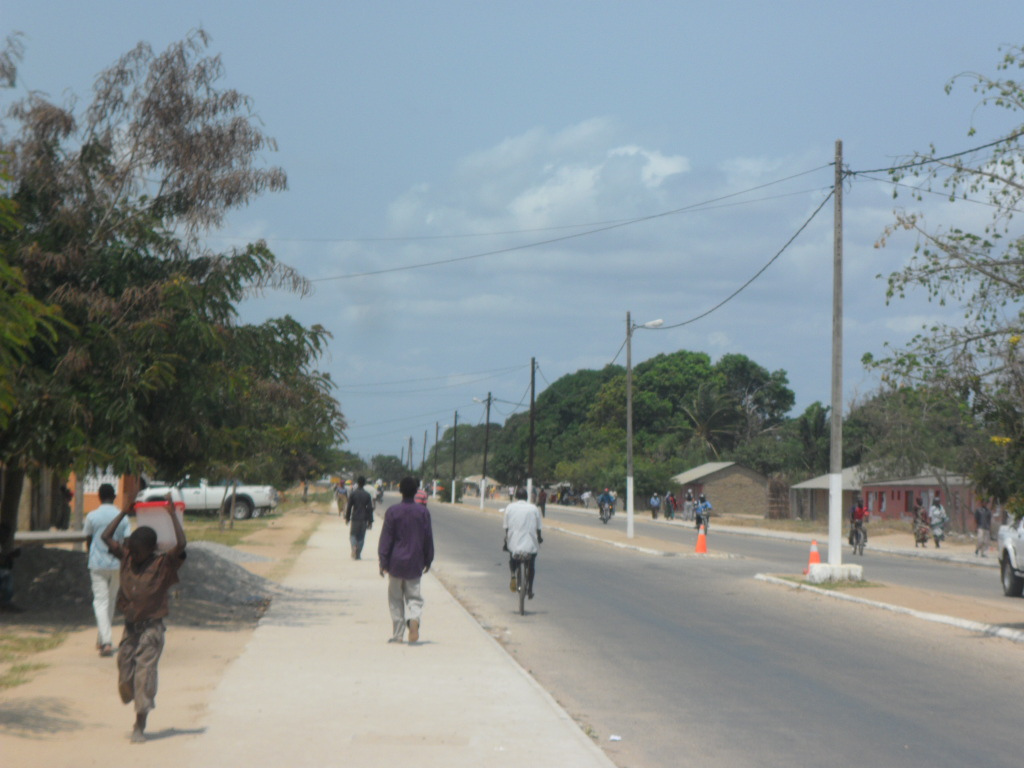 Mocimboa_da_Praia_10